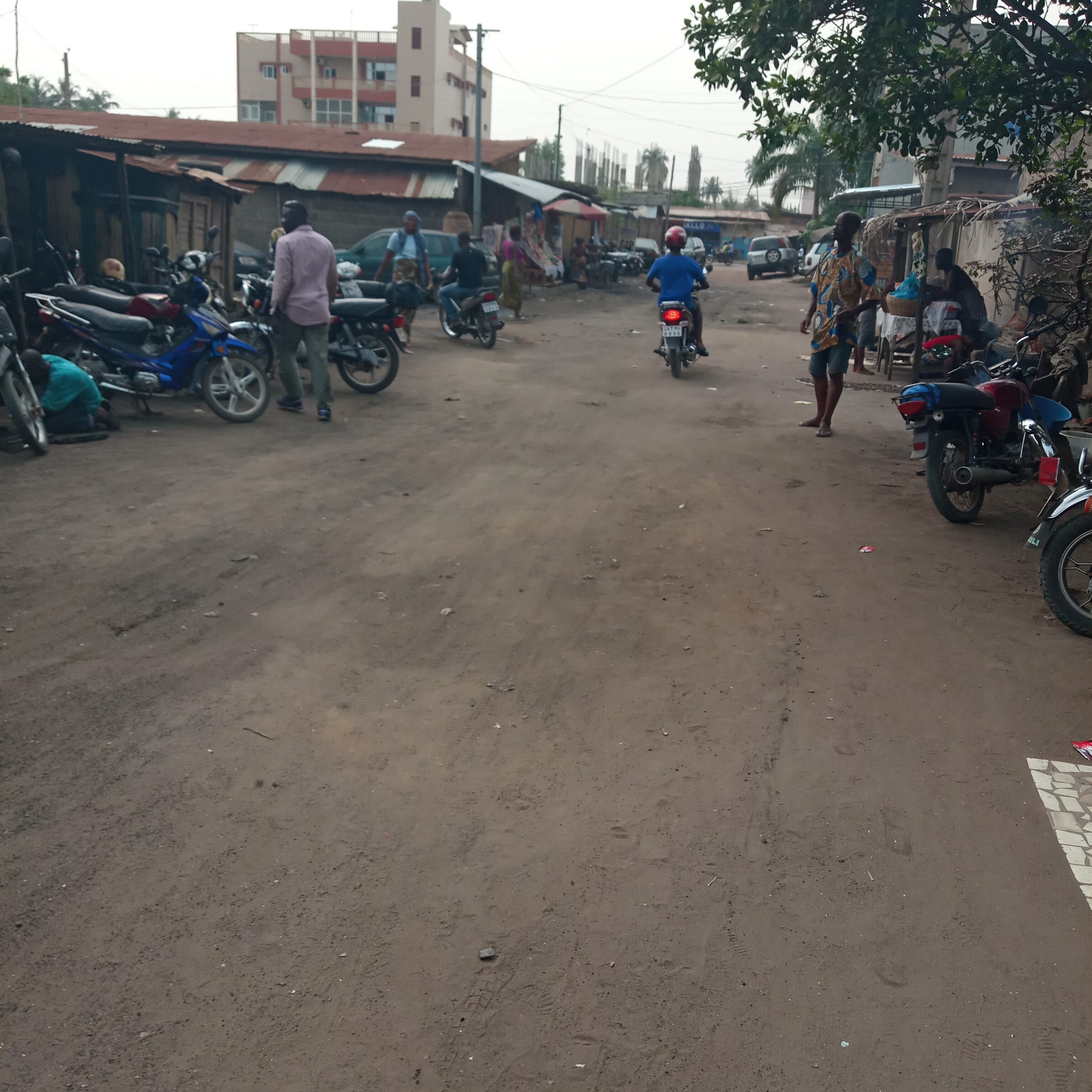 Godomey Salamey (Bénin)